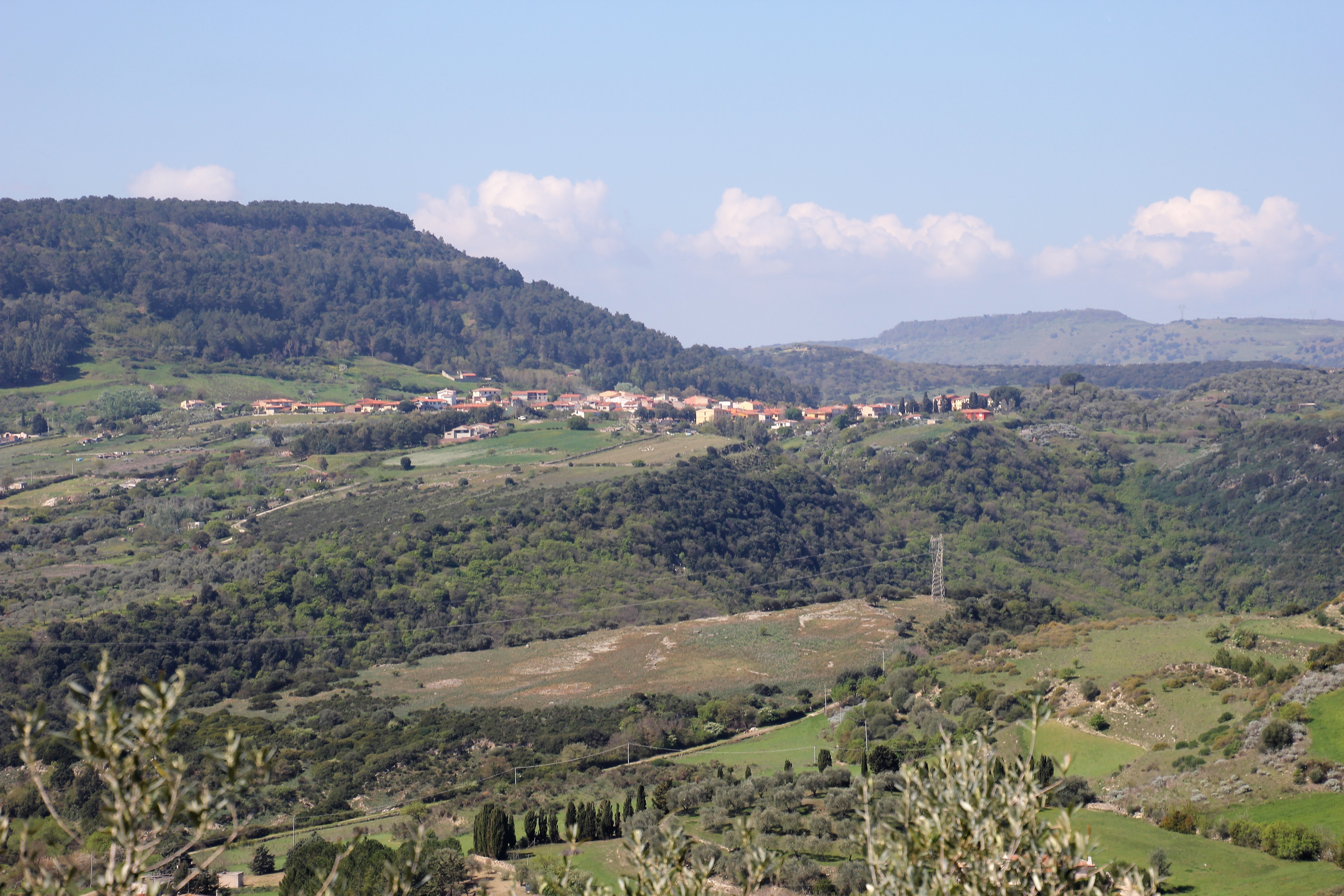 Banari, panorama